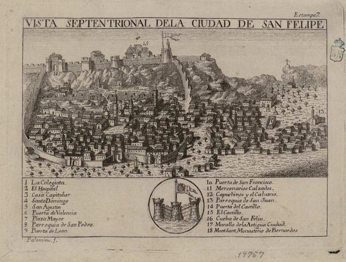 Vista septentrional de la ciudad de San Felipe, aguafuerte firmado Palomino f. Biblioteca Nacional de España